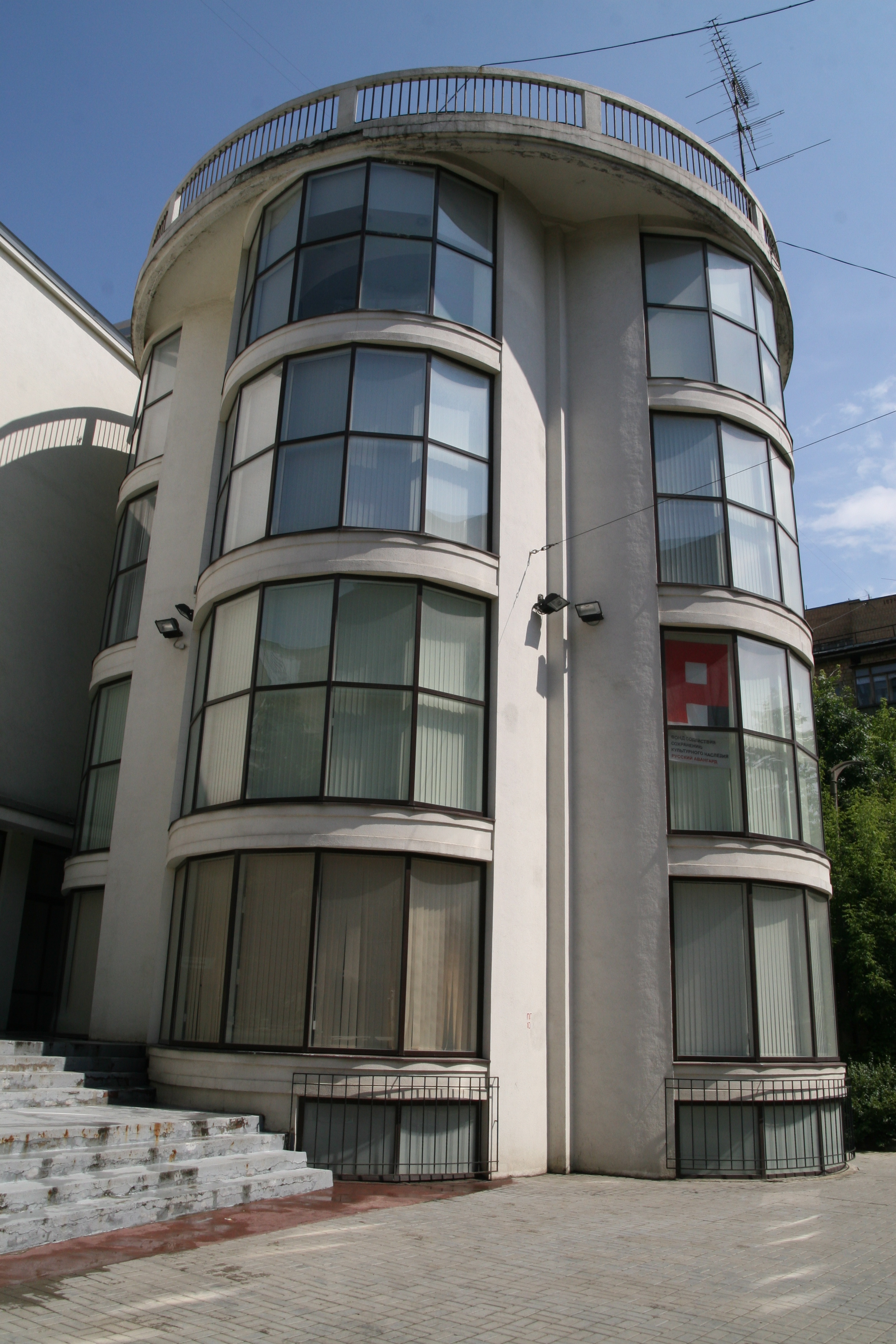 Здание клуба "Буревестник" (Арх. К. С. Мельников)